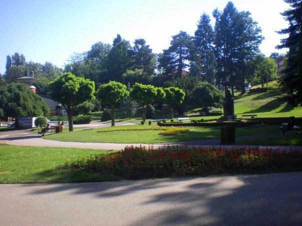 СП152) Споменик природе Паркови Врњачке Бање